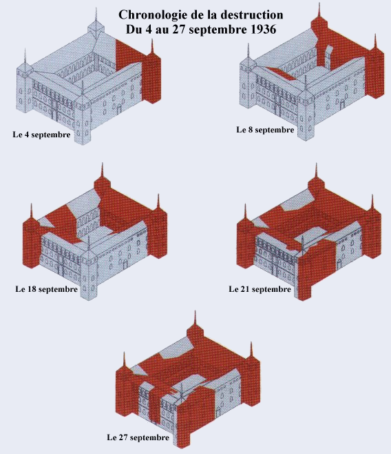 Esquema de la destrucción del Alcazar de Toledo 1936